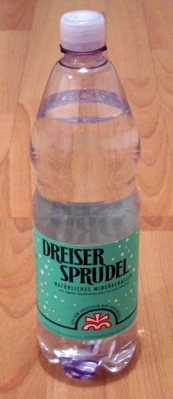 Wasserflasche